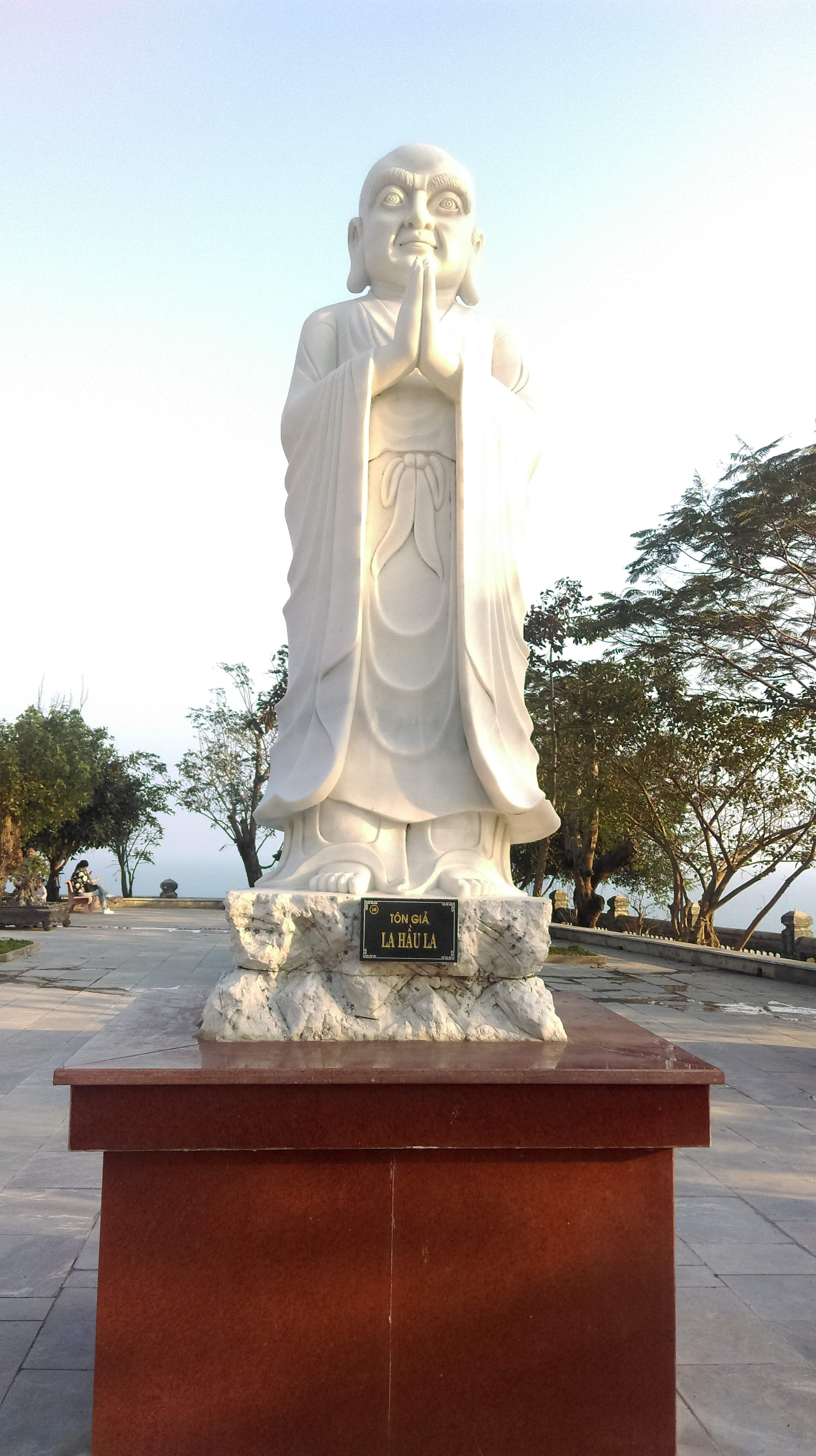 La Hầu La, chùa Linh Ứng Sơn Trà, Đà Nẵng